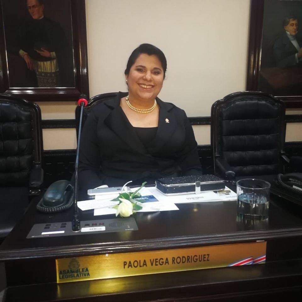 Fotografía de la diputada Paola Vega Rodríguez en el plenario de la Asamblea Legislativa el día primero de mayo del 2018.